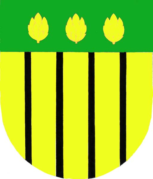 Znak obce Díly